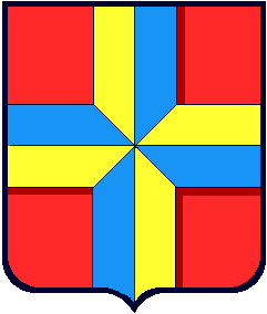 blason. Croix gironnée. Créa perso.GFDL